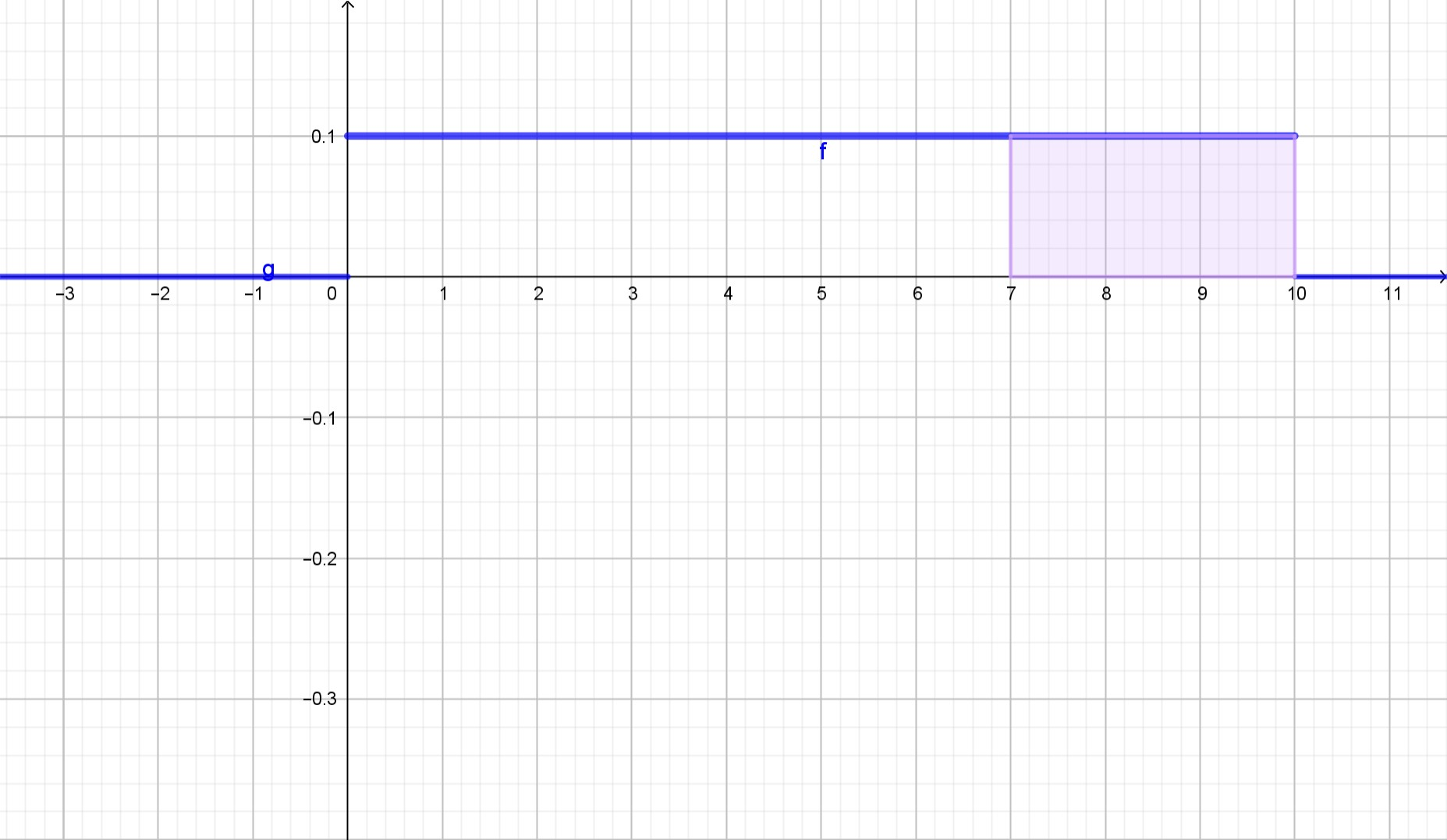 Funció de densitat d'una variable aleatòria contínua(exemple temps espera parada autobús)